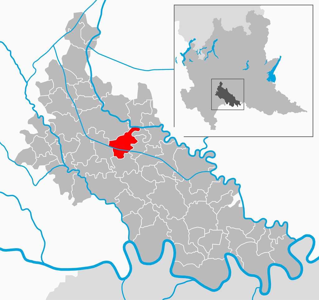 Il comune di San Martino in Strada nella provincia di Lodi